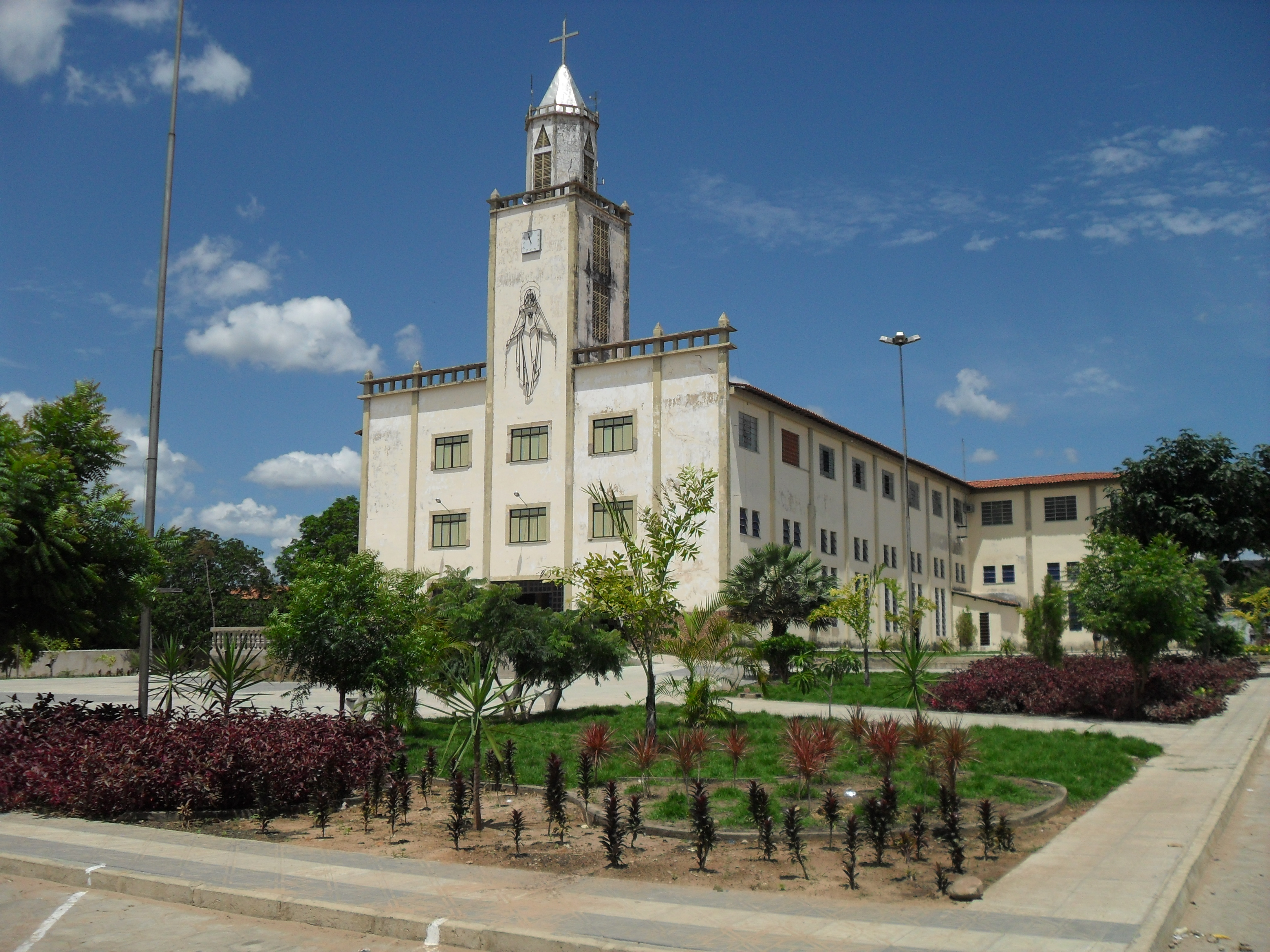 Catedral Nossa Senhora das Mercês, Bom Jesus - Piauí